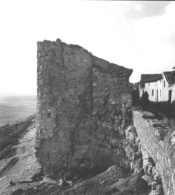 Murallas - Urueña (Valladolid) - Fotografía 180 x 225 B/N